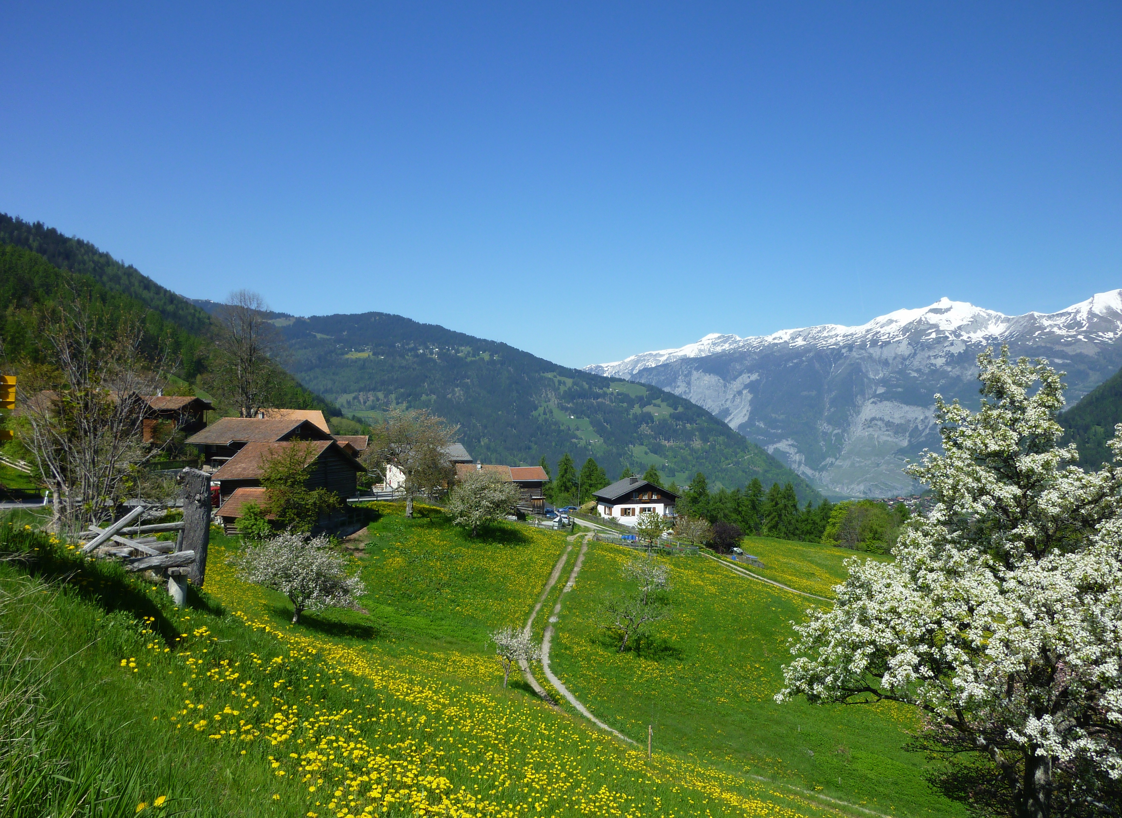 Praden, rechts hinten der Calanda